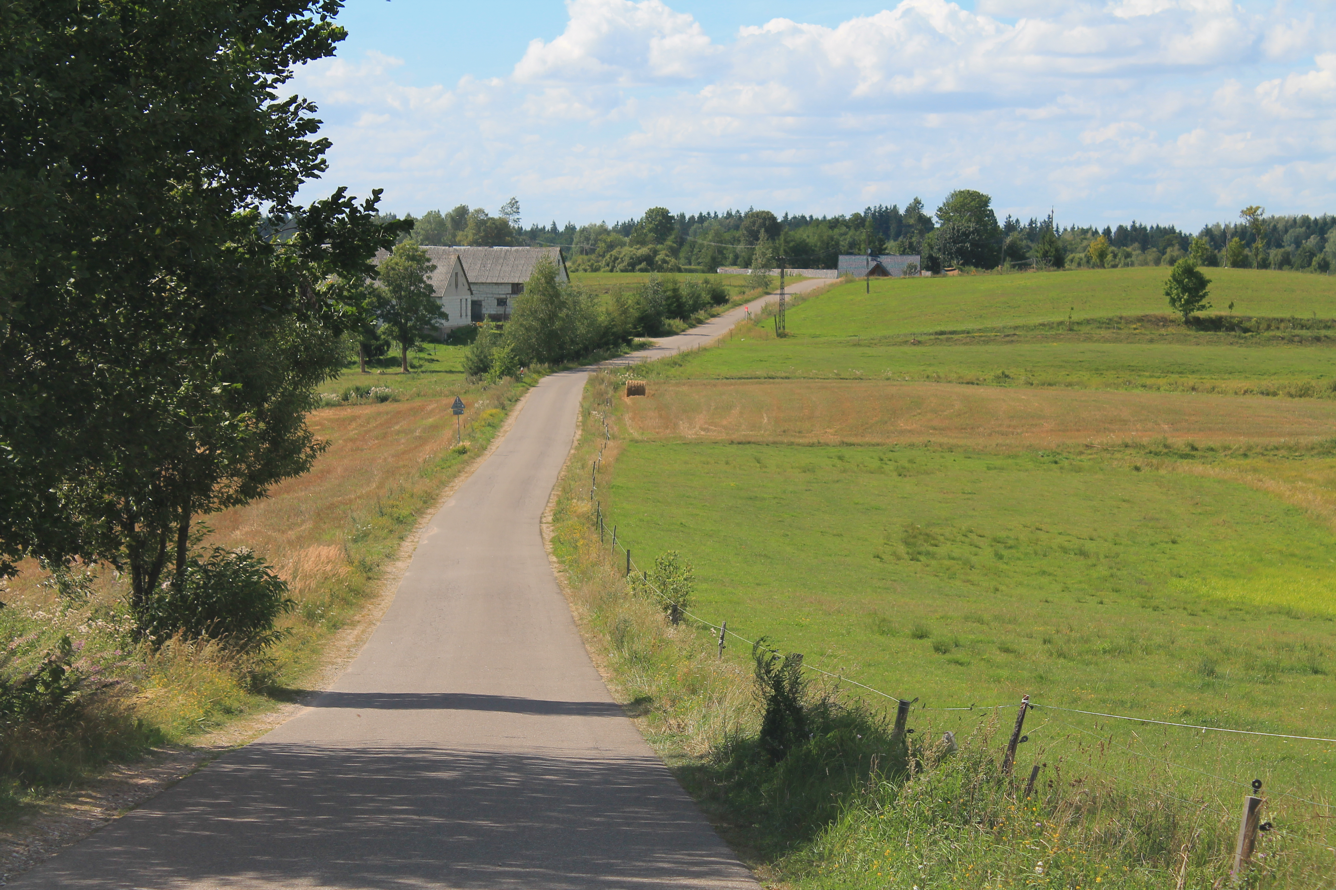 Droga utwardzona we wsi Grzybina prowadząca na Litwę.